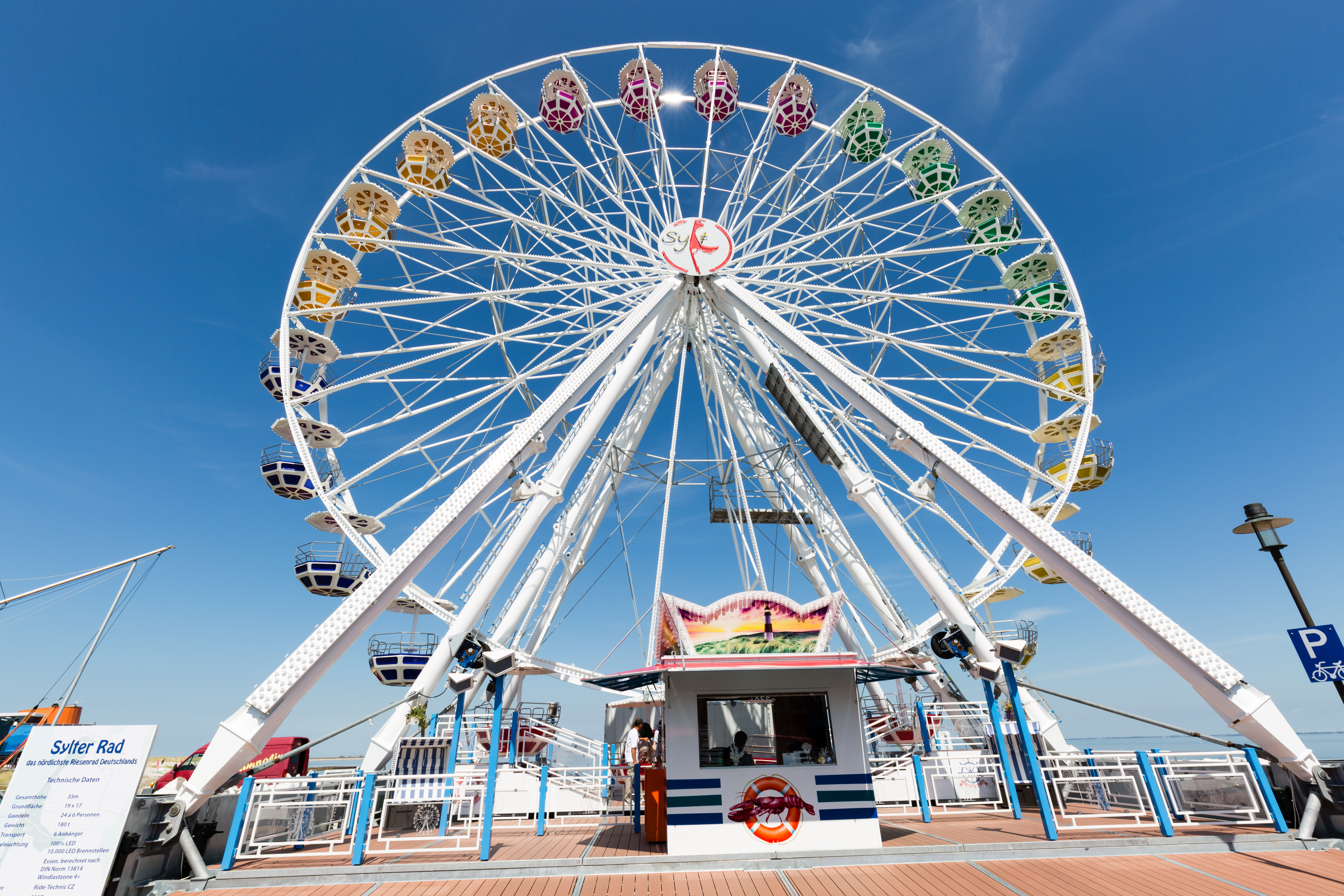 Das 35 Meter hohe "Sylter Rad" in List